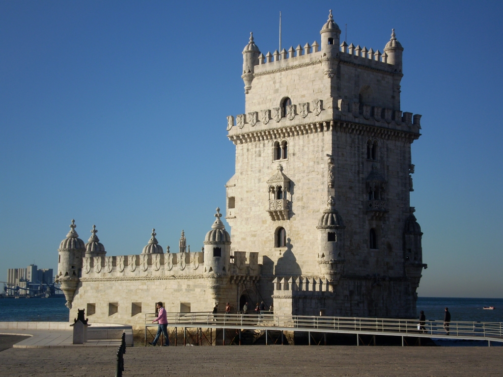 Բելեմի աշտարակը ծառայել է թշնամիներից պաշտպանվելու համար